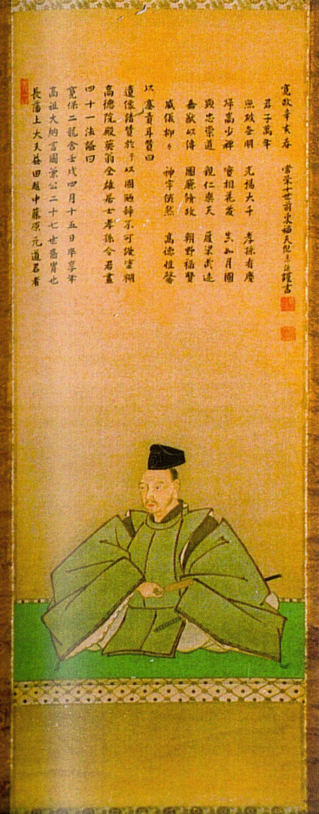 益田氏27代当主・益田元道の肖像画。萩市指定有形文化財。